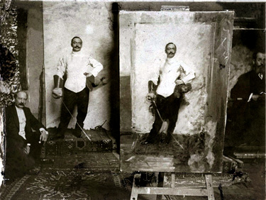 Cesare Tallone nel suo studio di Corso Garibaldi davanti ad Alessandro Pirovano e il suo ritratto.